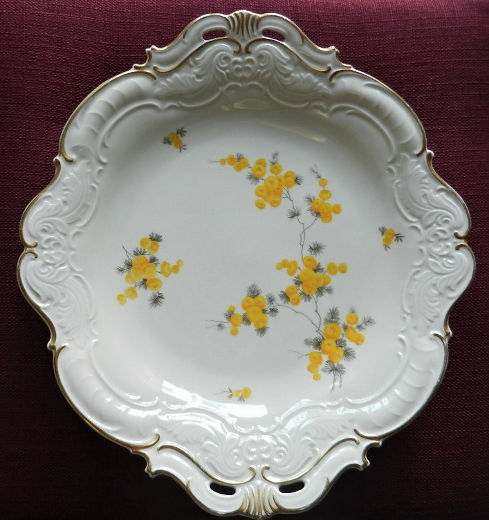 Kuchenteller der Porzellanfabrik Carstens Porzellan in Sorau. DEC. "MIMOSE"